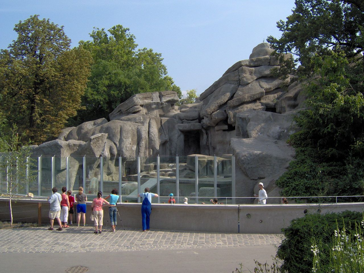 Budapesti állatkert, Kisszikla